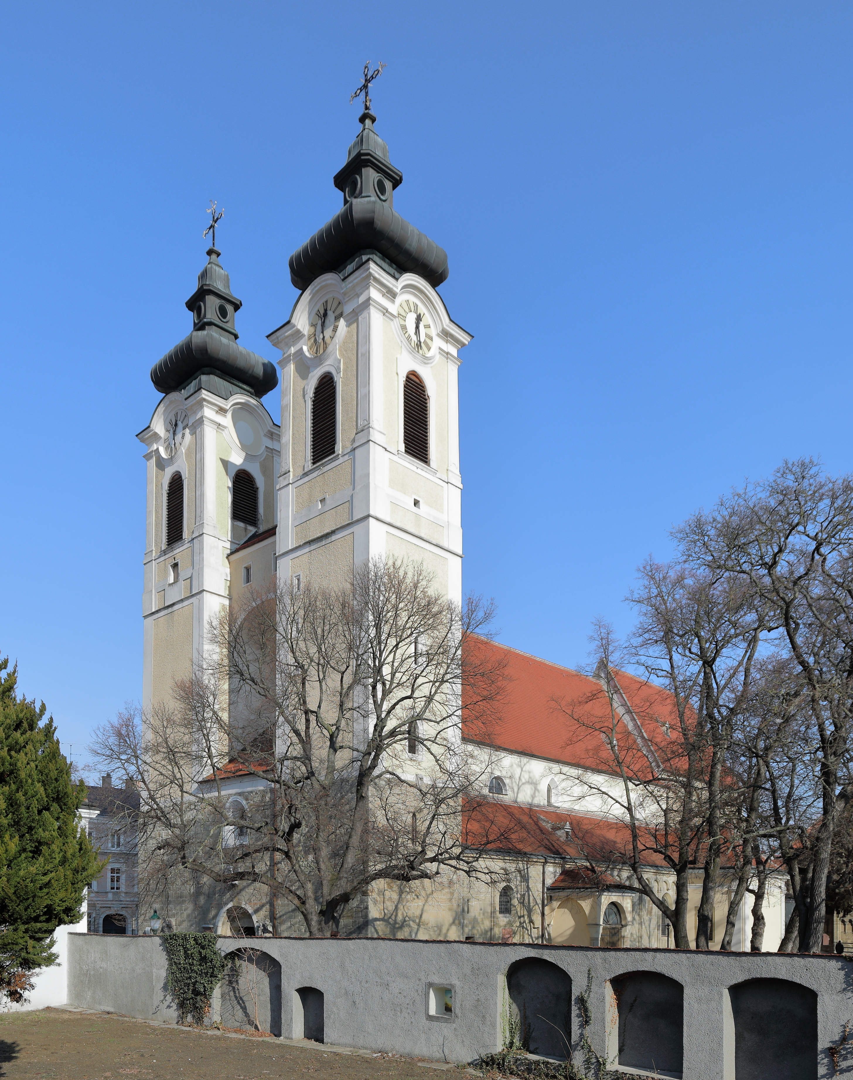 Südwestansicht der röm.-kath. Stadtpfarrkirche hl. Stephan in der niederösterreichischen Stadtgemeinde Tulln an der Donau.Eine romanisch/gotische Pfeilerbasilika mit monumentaler romanischer Doppelturmfassade. Nach einem Brand 1752 wurden die Türme im barocken Stil erhöht. Der gotische Chor wurde um 1300 errichtet.